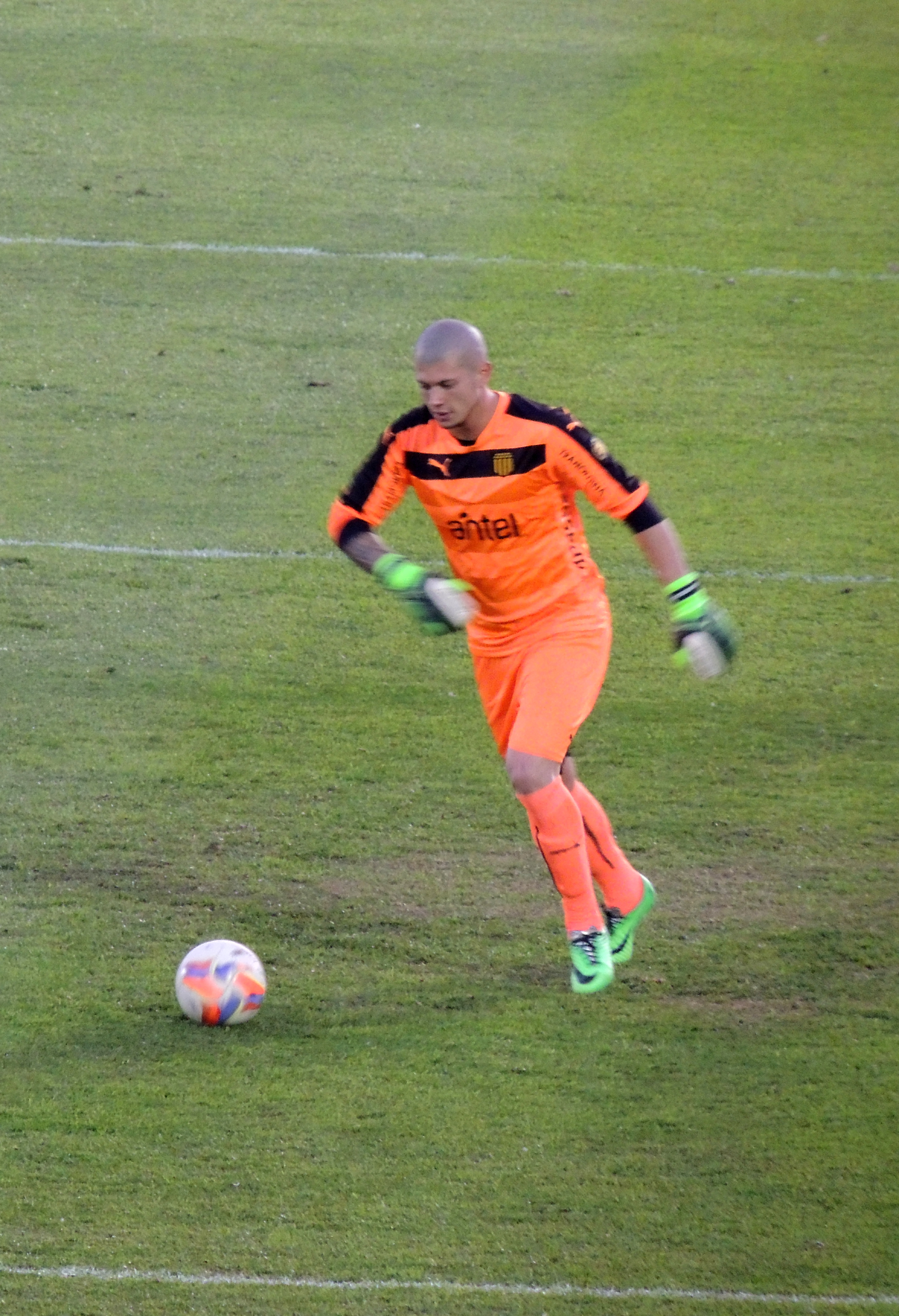 Imagen de Gastón Guruceaga